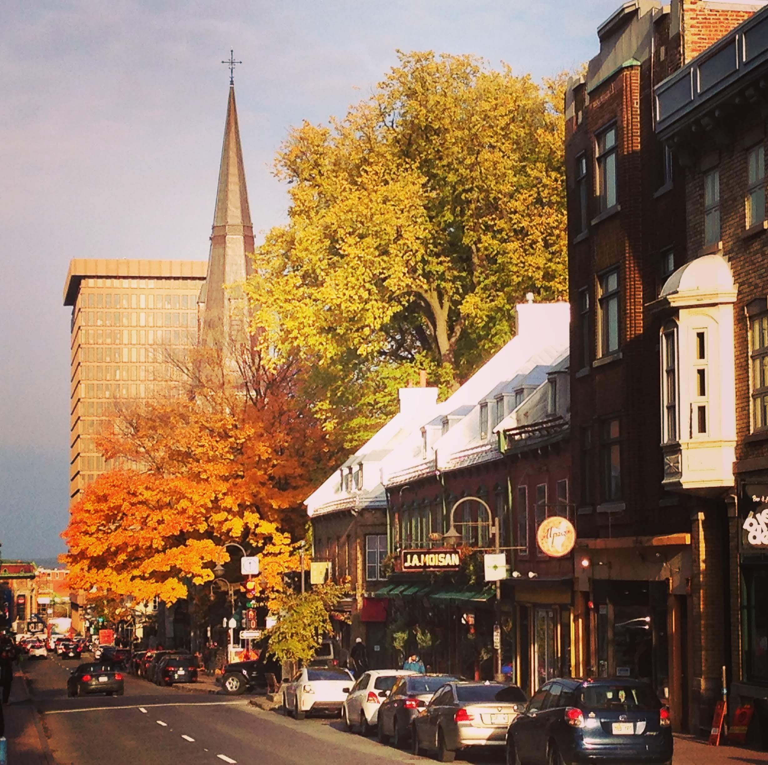 une journée d'automne en 2018